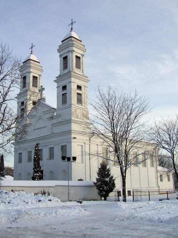 Šv. apaštalo Jokūbo church, Jonava, Lithuania.